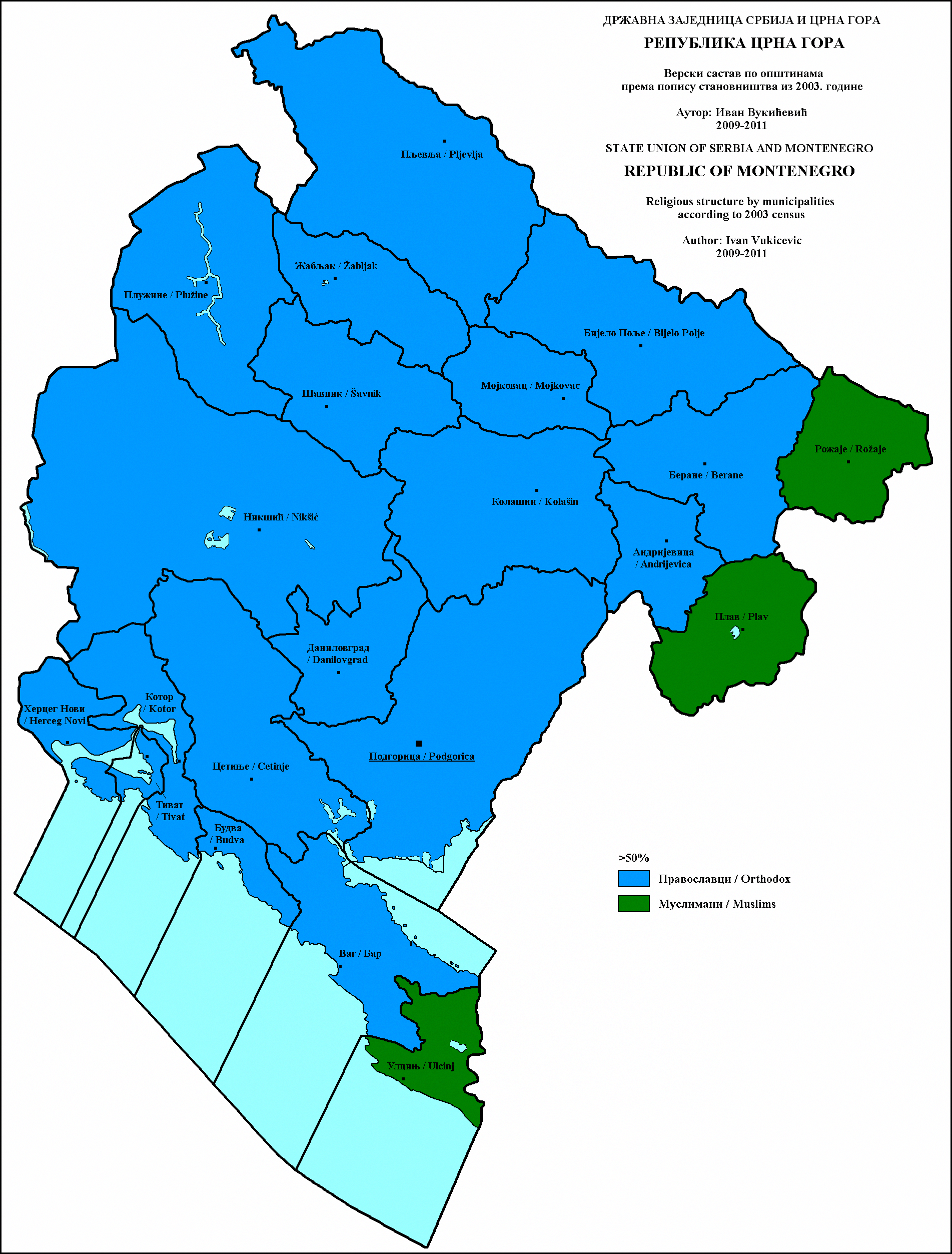 Верски састав Црне Горе по општинама 2003. године. Аутор: Иван Вукићевић